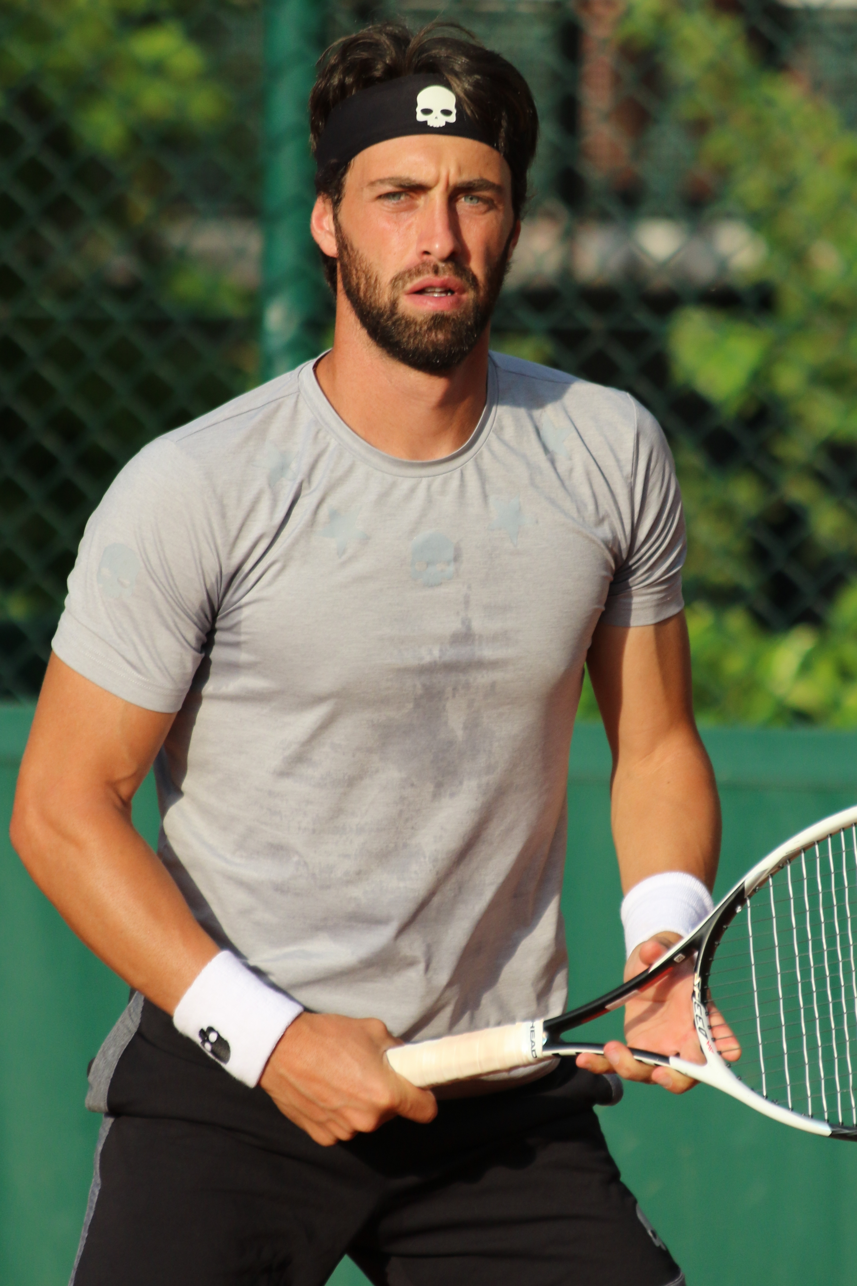 Basilashvili RG18